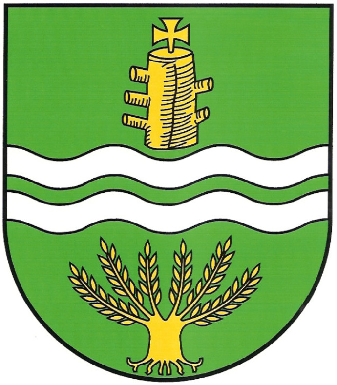 Herb gminy Gręboszów • Coat of arms of gmina Gręboszów